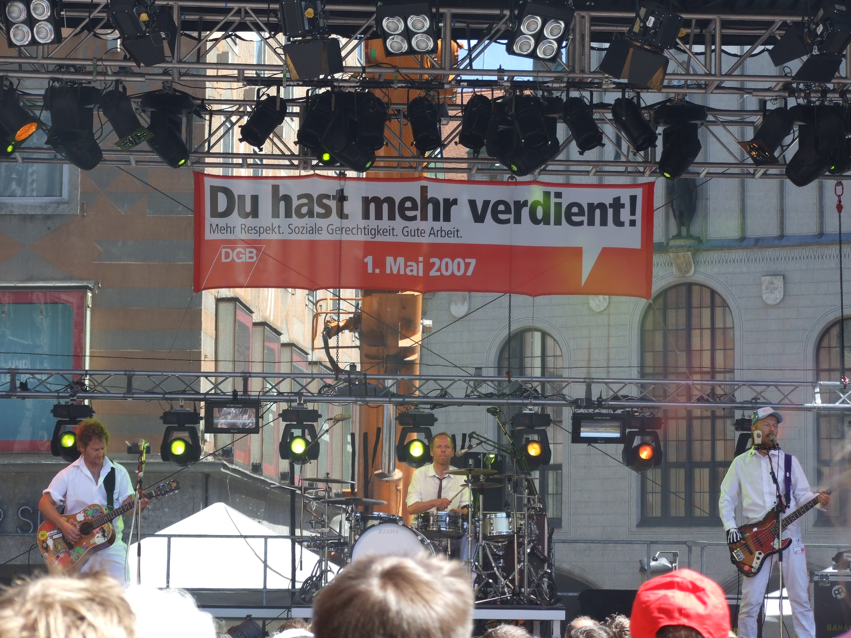 Bananafishbones